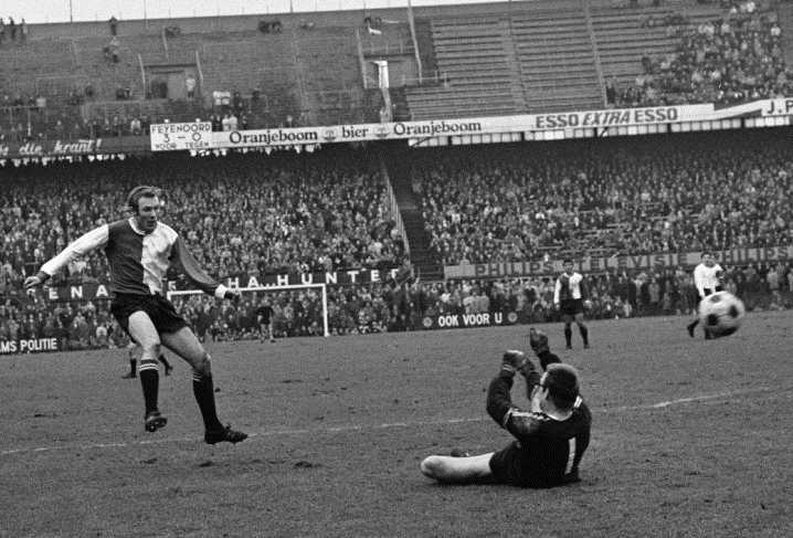 Feyenoord tegen NAC 5-0. Piet Vrauwdeunt scoort 4-0 over NAC-keeper Peter van der Merwe.